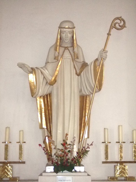 Stiftskirche Bad Buchau, Landkreis Biberach Statue der Irmgard von Buchau (= Irmgard von Chiemsee)